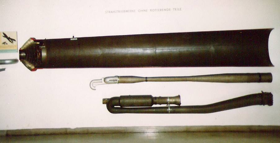 Pulsojetten im Deutsches Museum München